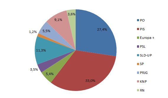 źródło danych